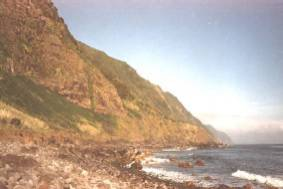 Fajã Rasa falésia costa norte, ilha de São Jorge, Açores, Portugal.